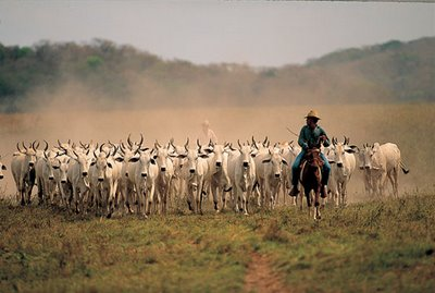 Economia de Fortul